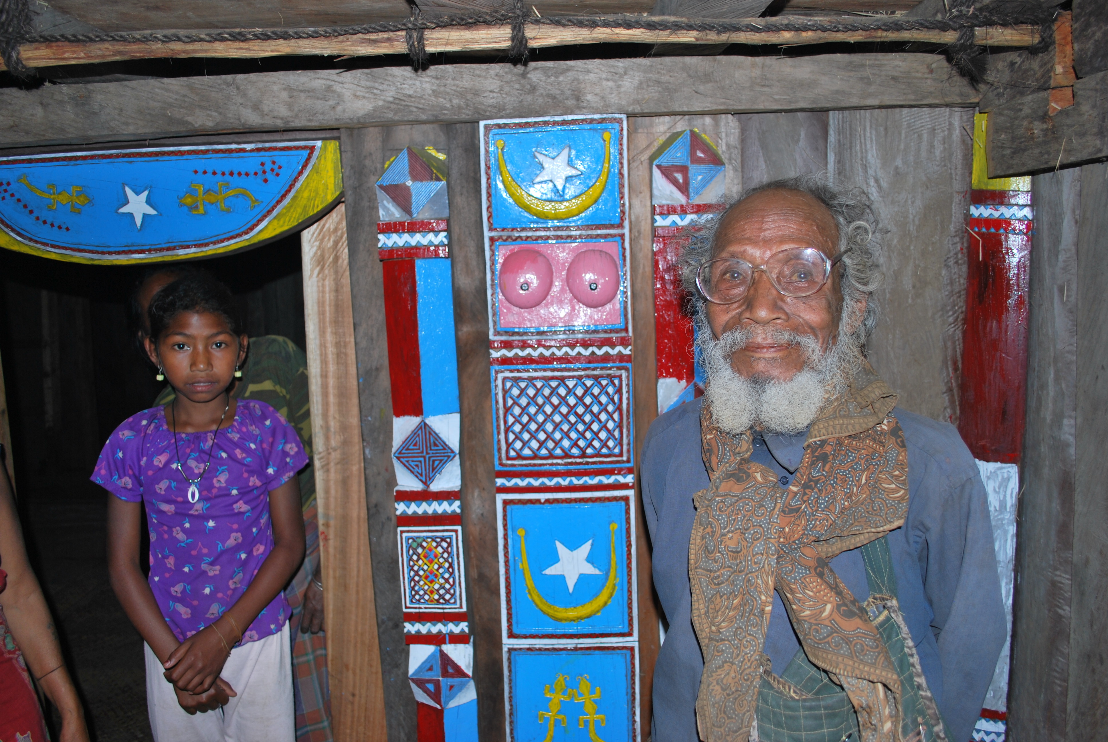 In einem Heiligen Haus (Uma Lulik) in Fatuc Laran, Lactos, Cova Lima, Osttimor